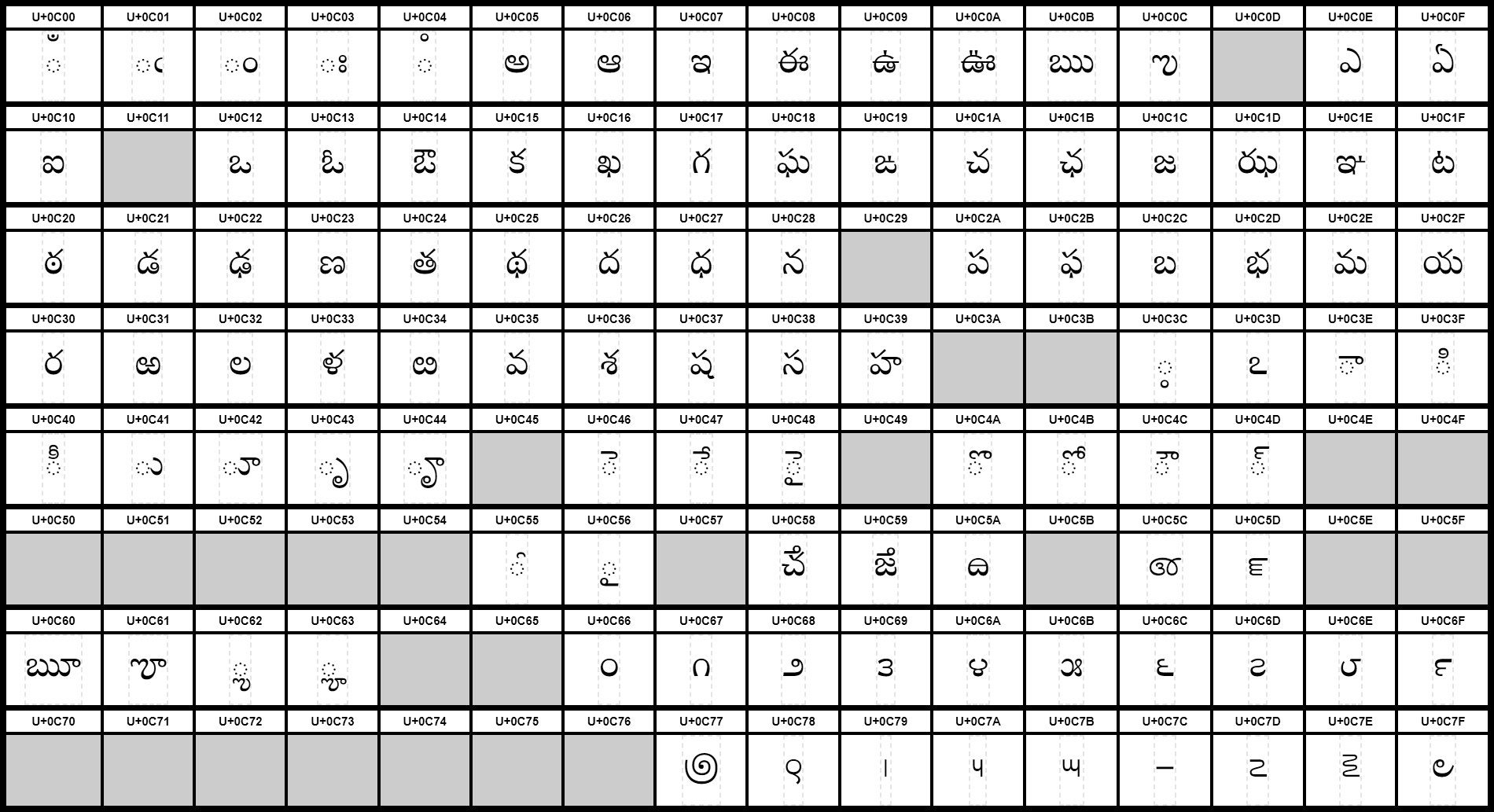 Grafiktafel für den Unicodeblock Telugu. Schraffierte Felder sind unbesetzte Codepoints, graue Felder sind fehlende gemeinfreie Glyphen.